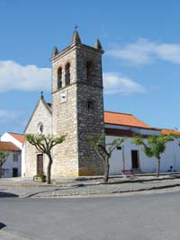 Igreja Matriz de Nossa Senhora da Purificação, em Pontével, Cartaxo, Portugal.